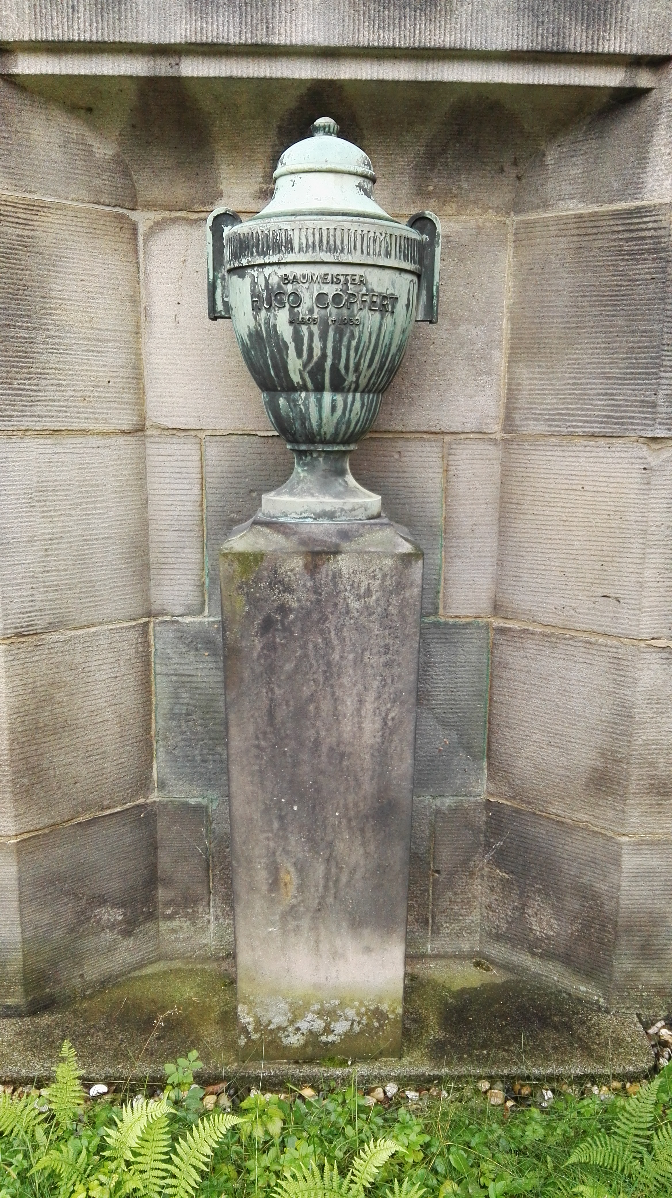 Grabstätte des Baumeisters Hugo Göpfert auf dem Urnenhain Tolkewitz